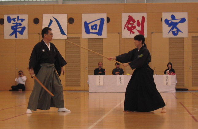 Scène de jodo centrée sur les combattants